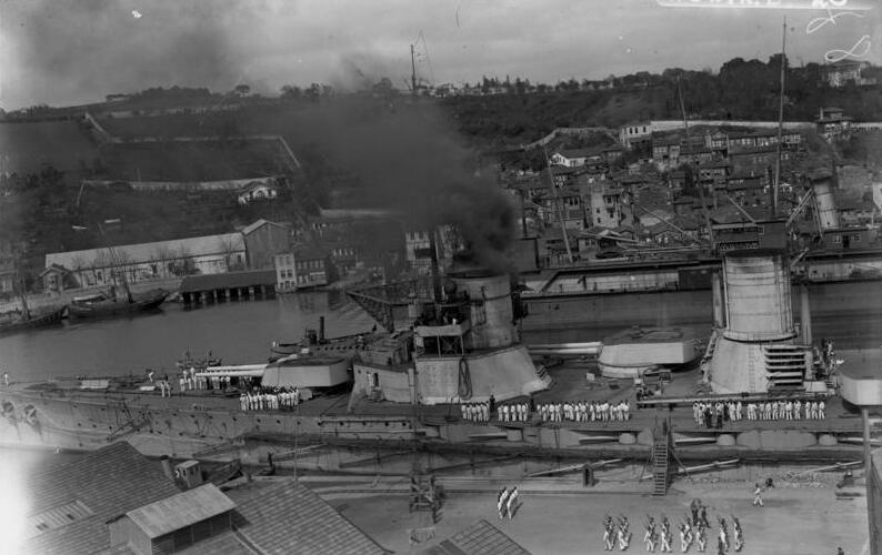 Stenia, Bosporus, Kreuzer Goeben im Hafen Großer Kreuzer Goeben in Stenia, an der europäischen Seite des Bosporus